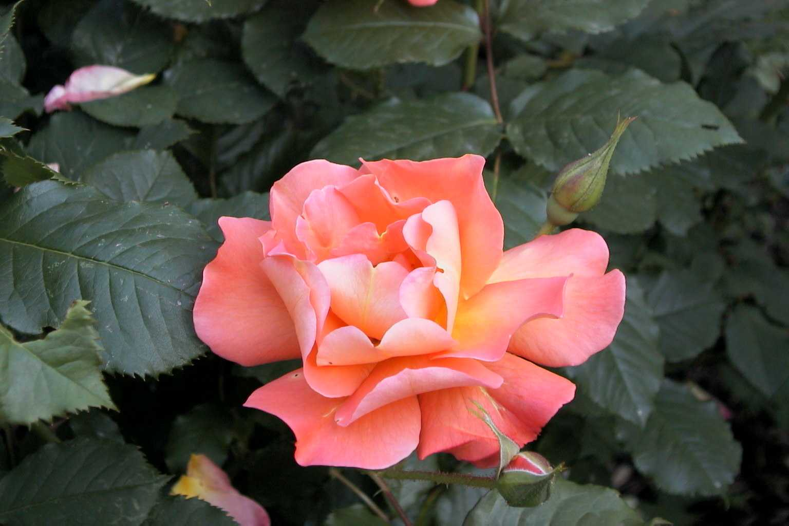 Rosa 'Westerland'